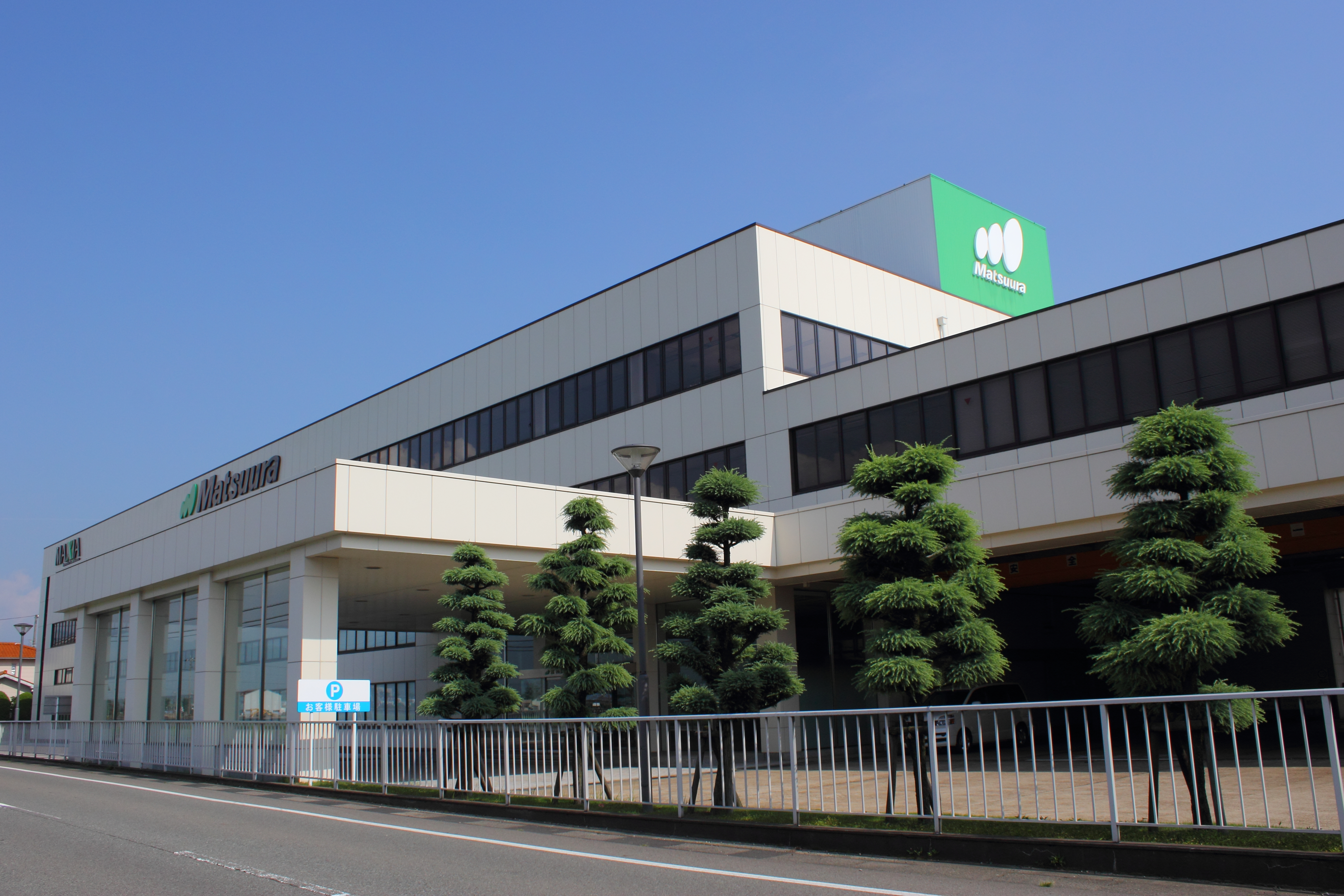 松浦機械製作所